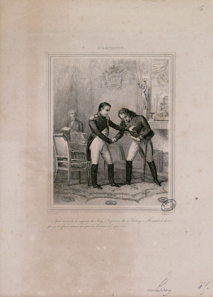 Légende de la gravure : "Après avoir lu le rapport du jury, Napoléon dit à Larrey : "il serait à désirer que je ne fusse entouré que par des hommes tels que vous." Ancely, René (1876 - 1966). Possesseur